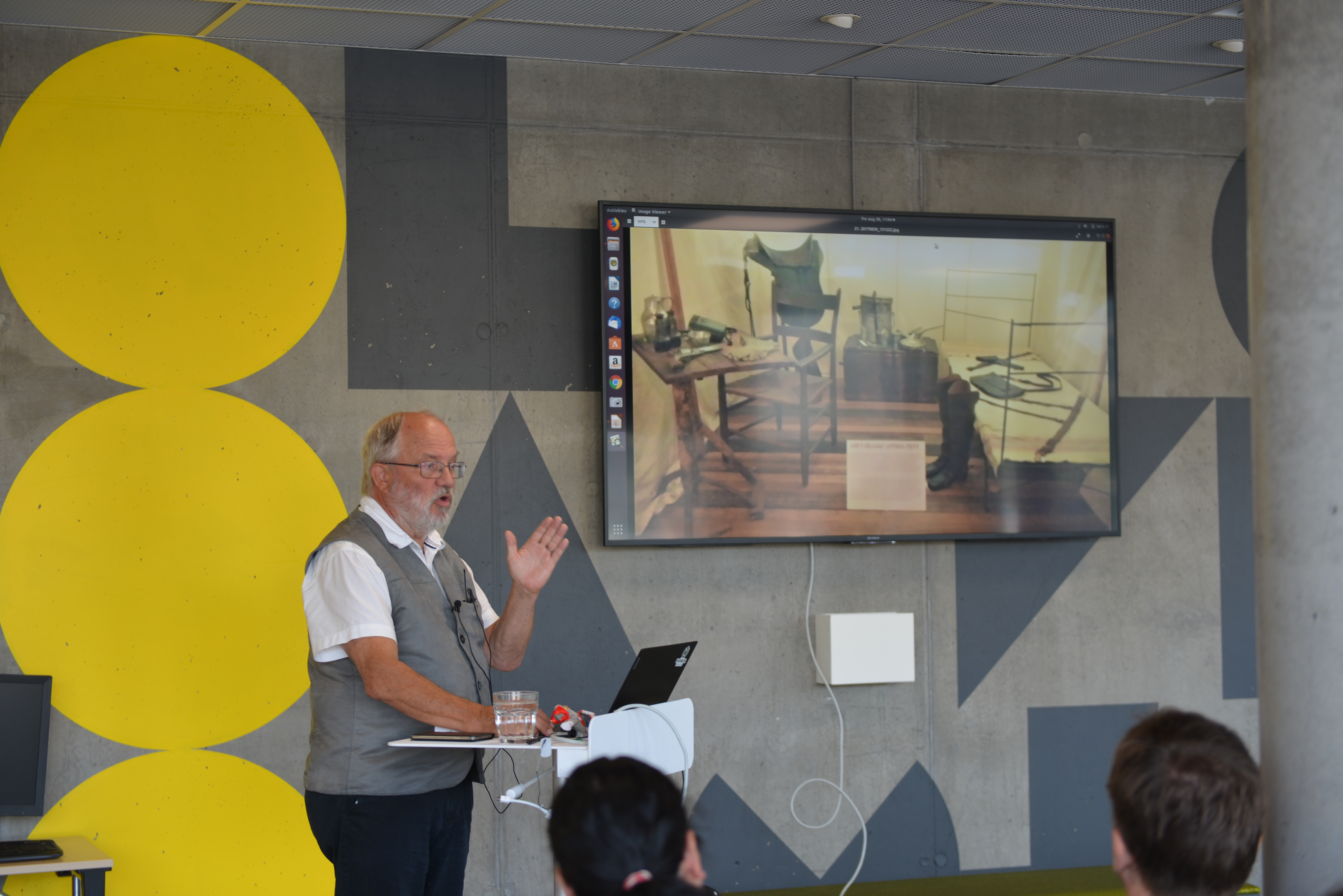 Workshop om hur GLAM-institutioner kan hantera data som är problematiskt, arrangerad av Wikimedia Sverige och Riksantikvarieämbetet 2019-08-30. Presentation av Stefan Bohman, författare till boken Skelett i garderoben.